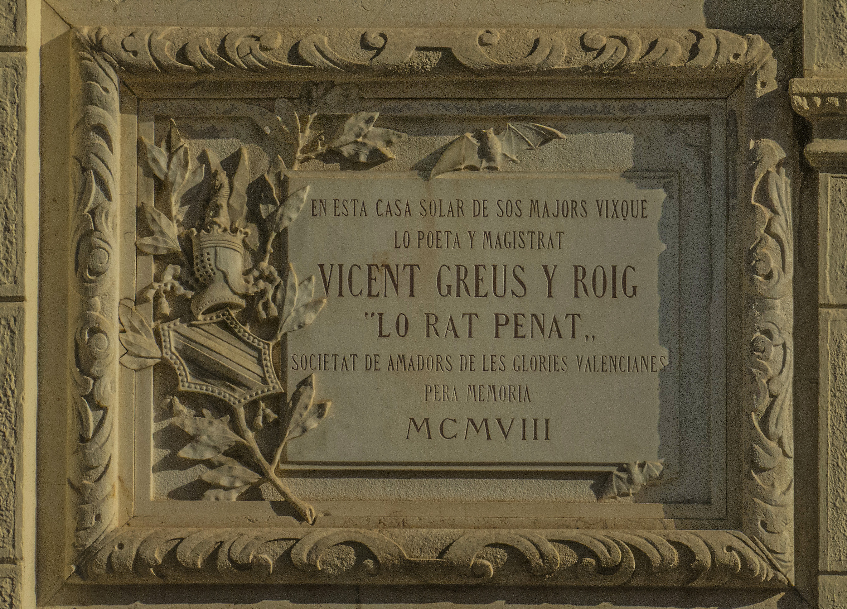 Projecte de col·laboració de l'Arxiu Ismael Latorre Mendoza amb Wikimedia Commons i Amical Wikimedia. Vicent Greus i Roig d'Alginet, magistrat i poeta. Va seguir la carrera de magistratura i va morir a Barcelona sent president de Sala.